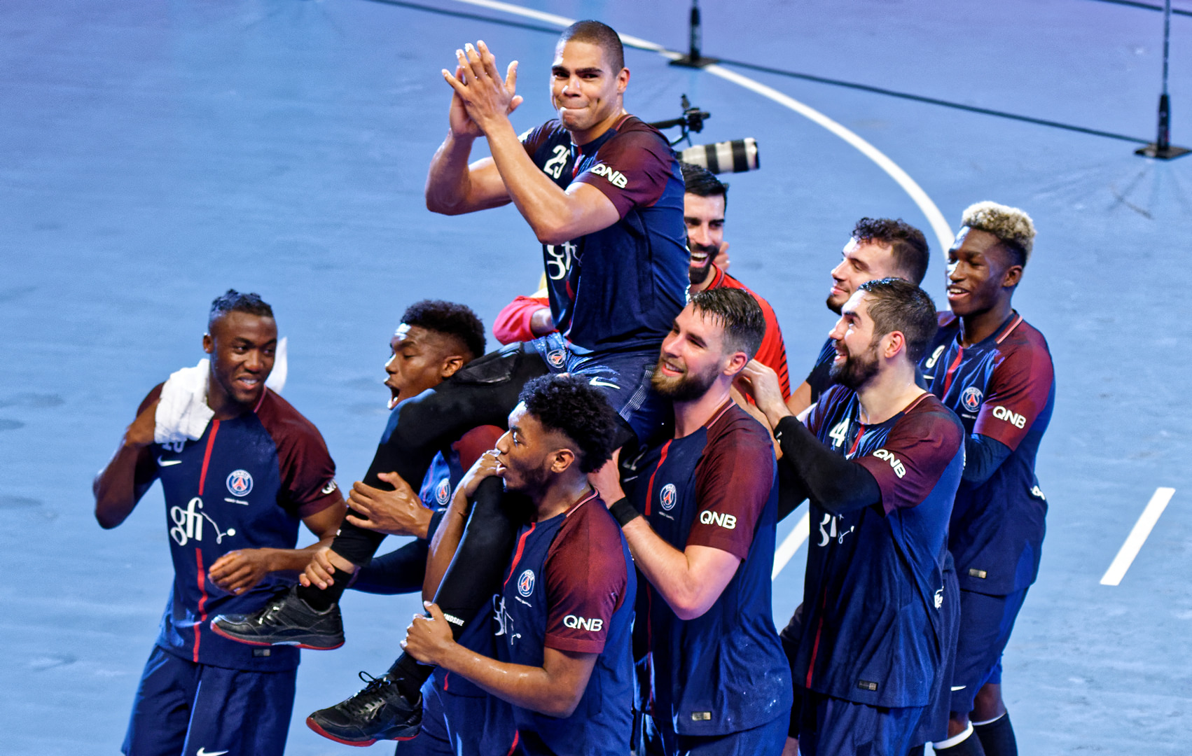 Tout dernier match de la carrière du handballeur français Daniel Narcisse. Il est transporté pour un dernier tour d'honneur par ses co-équipiers du PSGHandball à la fin de la rencontre contre Chambéry, dernier match de la saison 2017-18 de Lidlstarligue. Le 31 mai 2018 dans la salle Pierre de Coubertin à Paris.